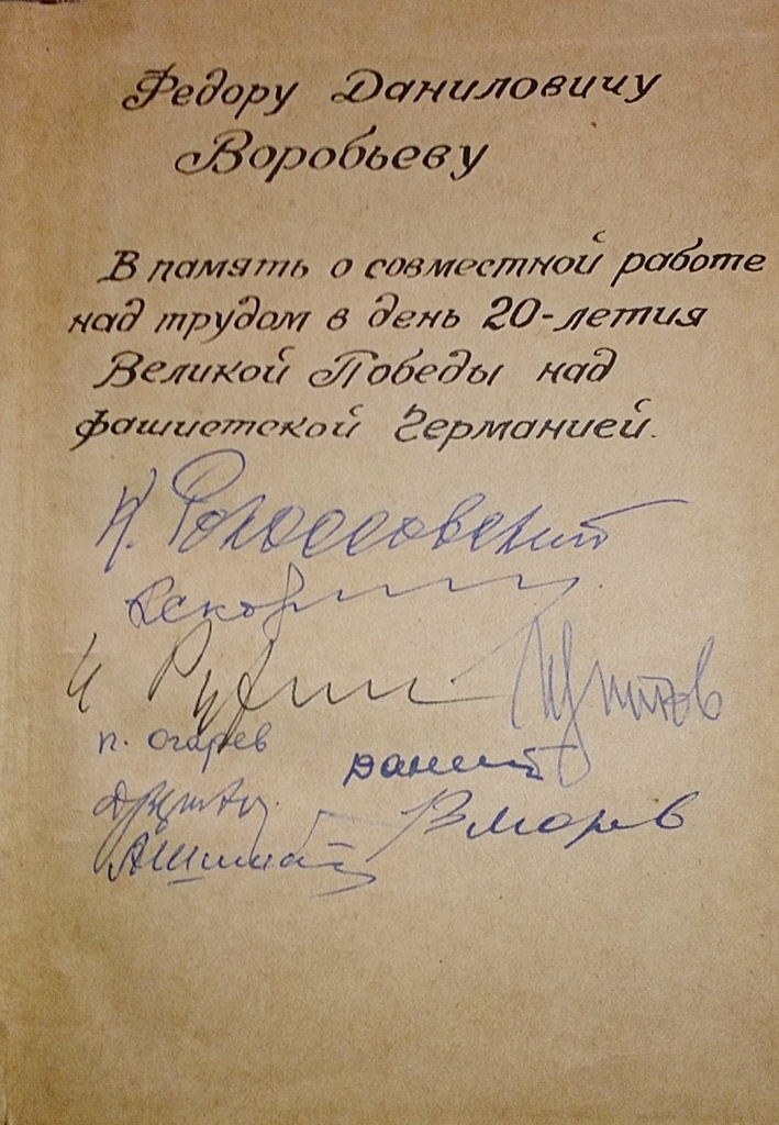 Книга Великая победа на Волге (под редакцией Маршала Советского Союза К.К. Рокоссовского) – Воениздат